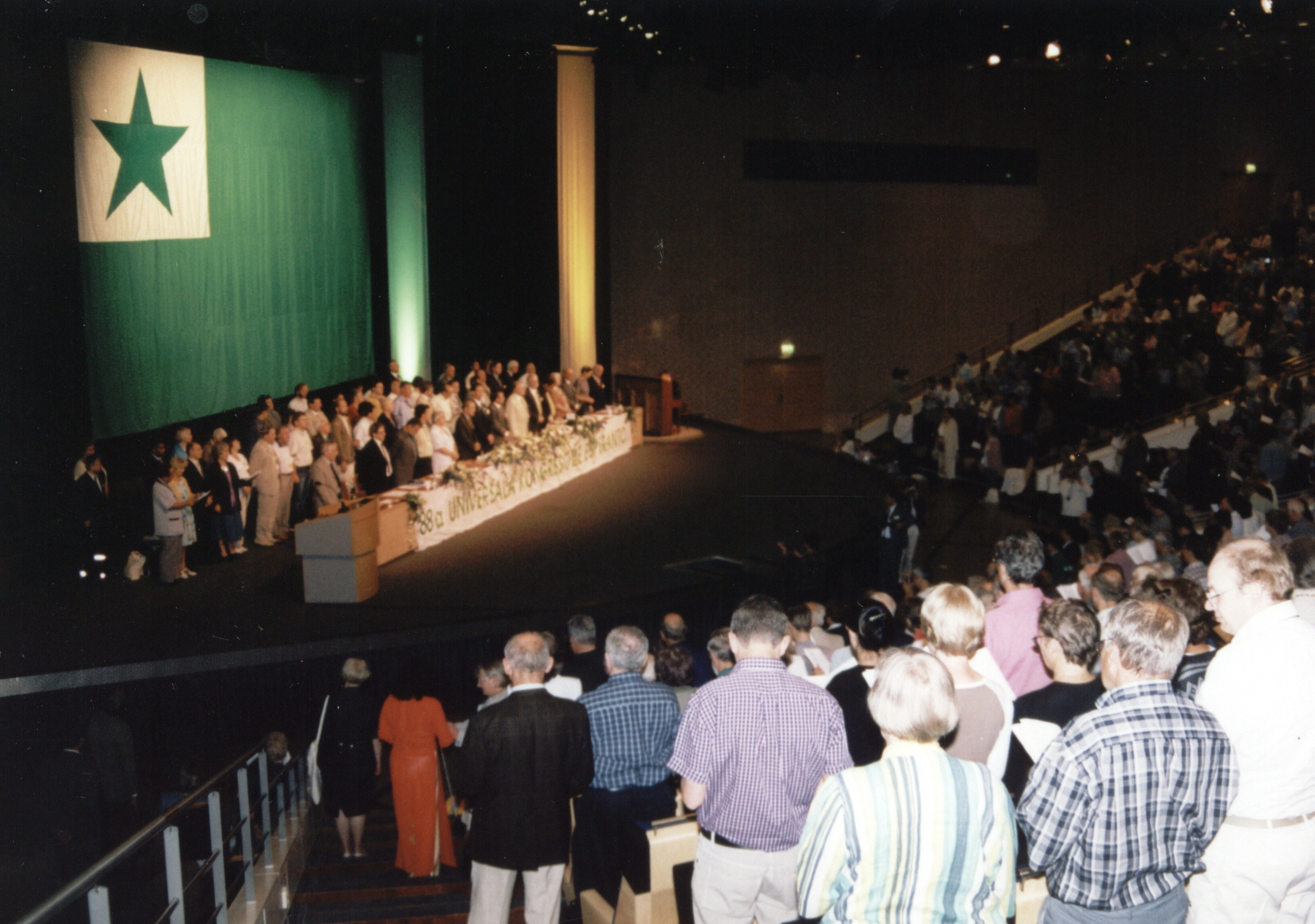 Universala Kongreso de Esperanto, Gotenburgo 2003. Inauxguro, himno.